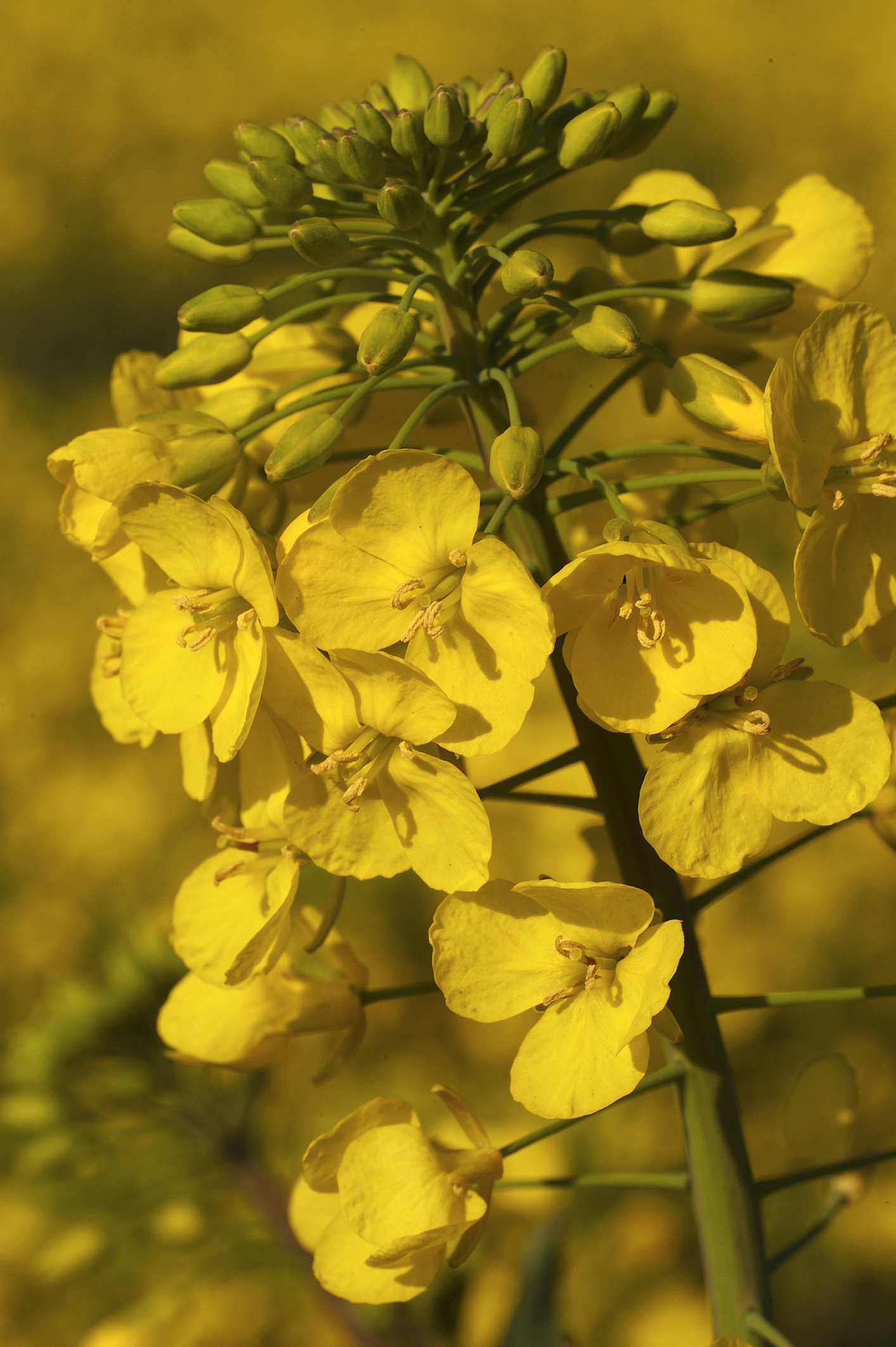 INRA, Jean Weber